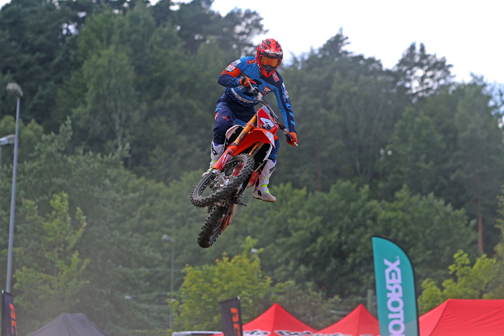 Superenduro Borås 2017